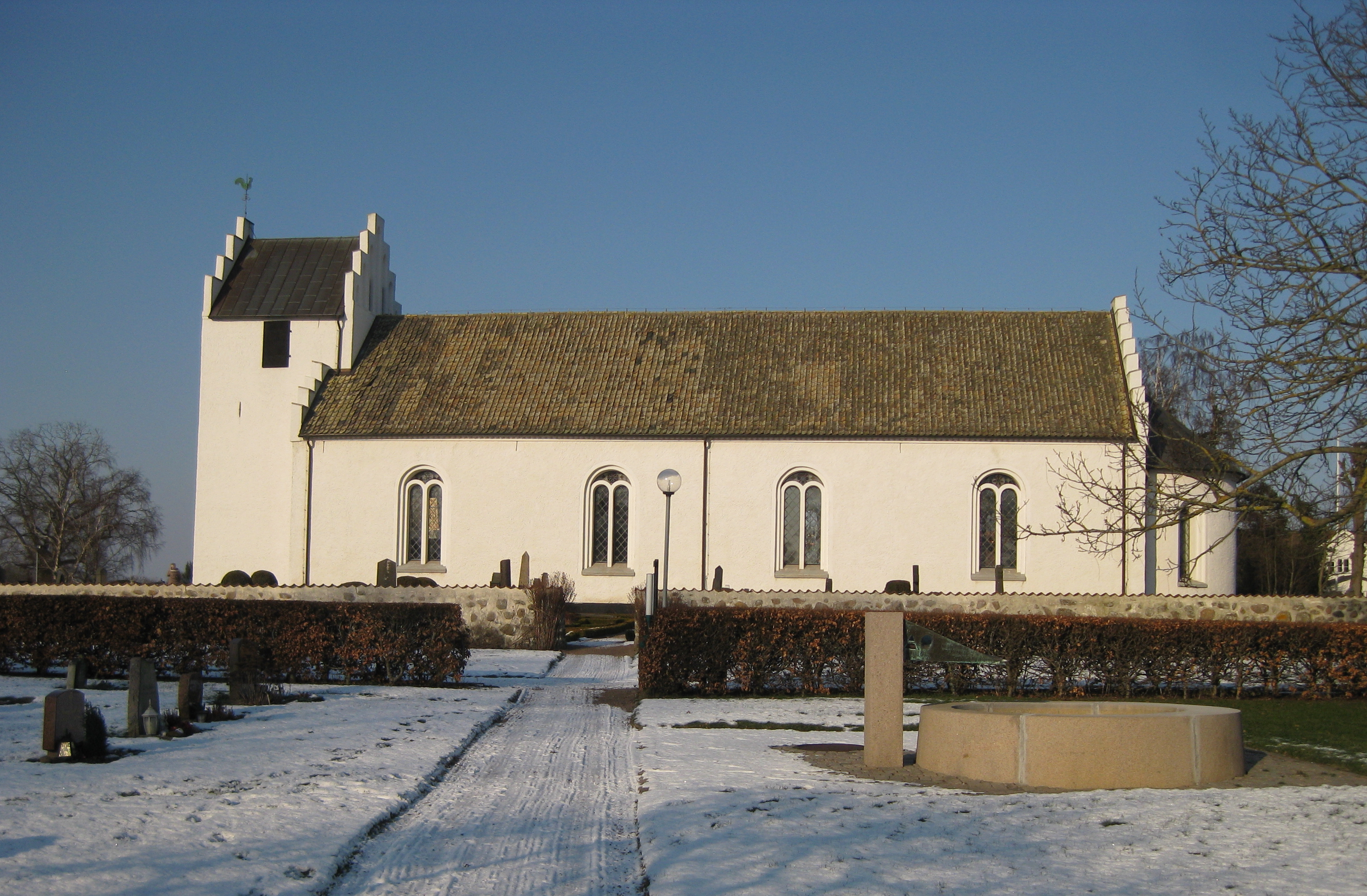 Bårslövs kyrka 2012